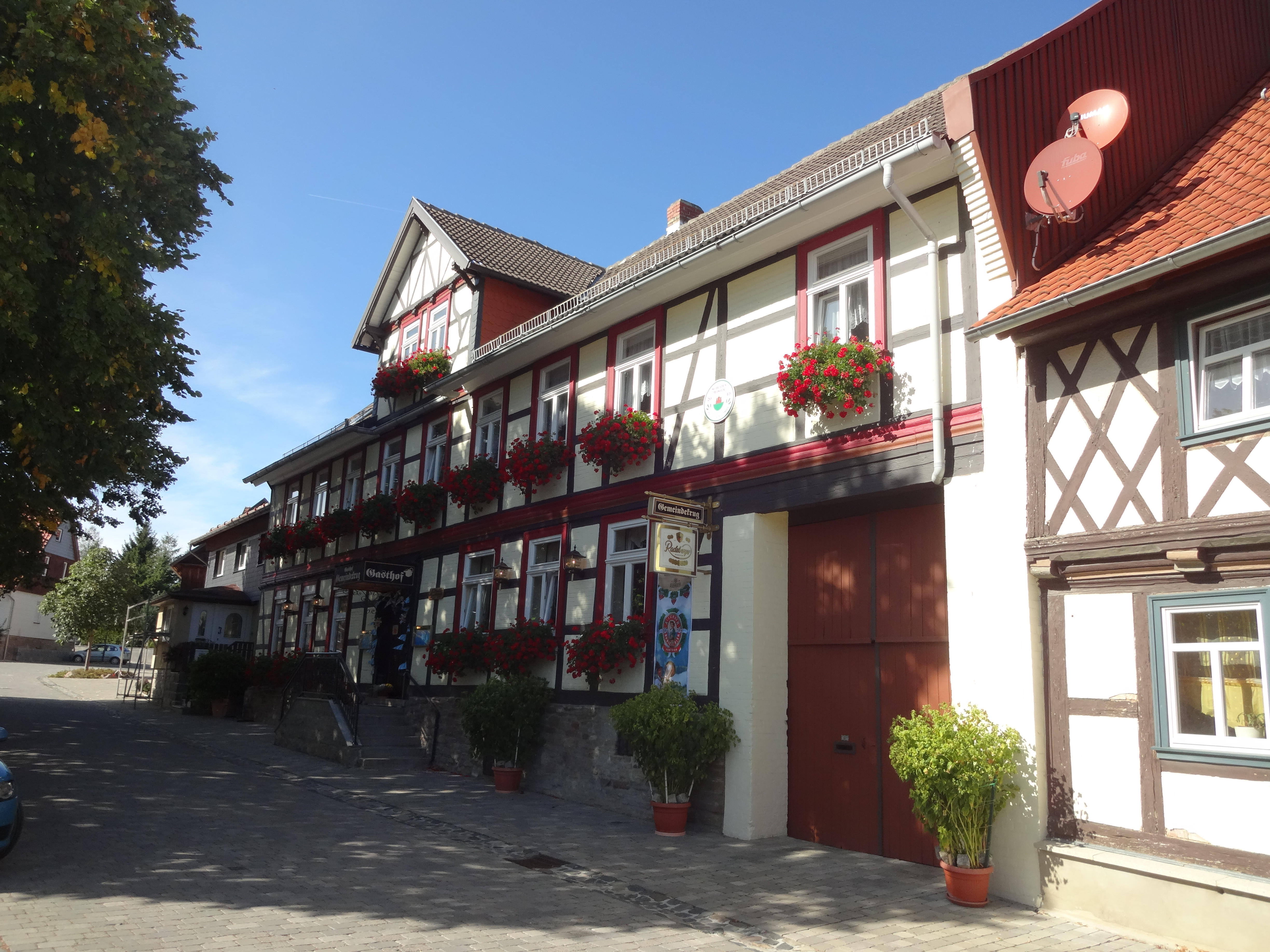 denkmalgeschützter Gasthof in der Hauptstraße 7 in Drübeck